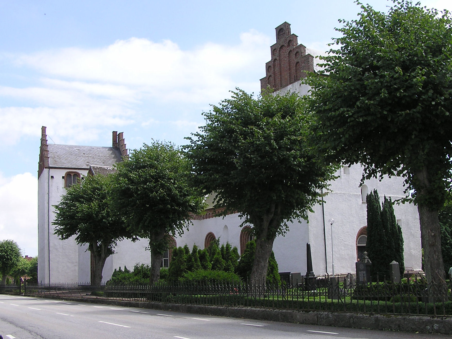 Løderup kirke i Skåne